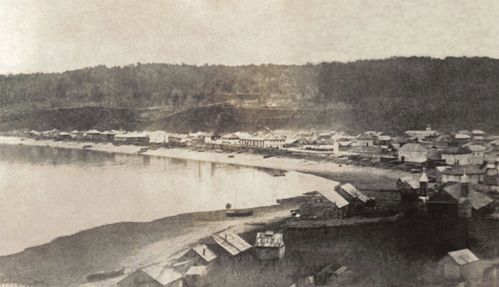 Primera fotografía conocida de Puerto Montt - Chile - 1862